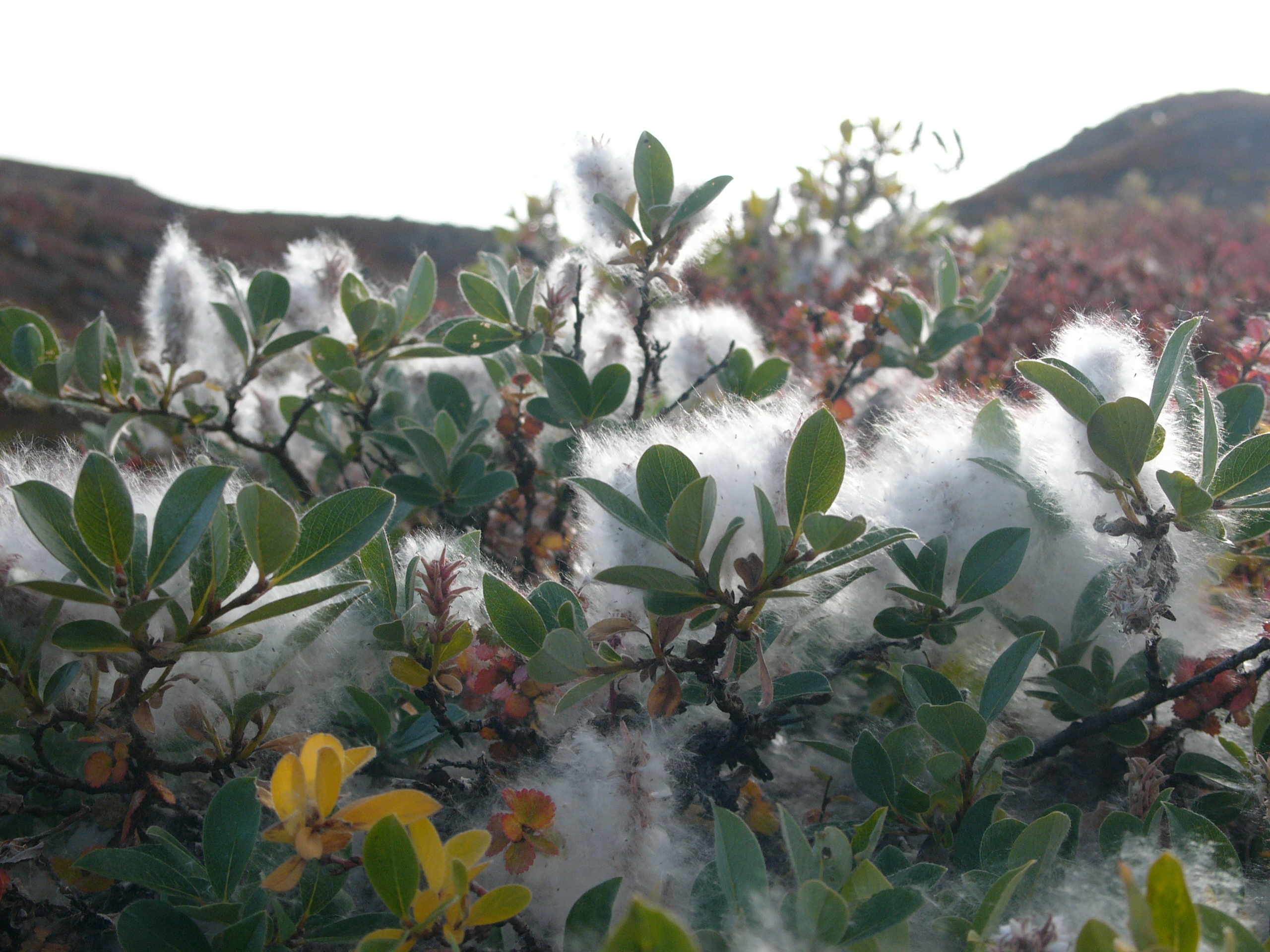 Salix glauca in East Greenland tundra